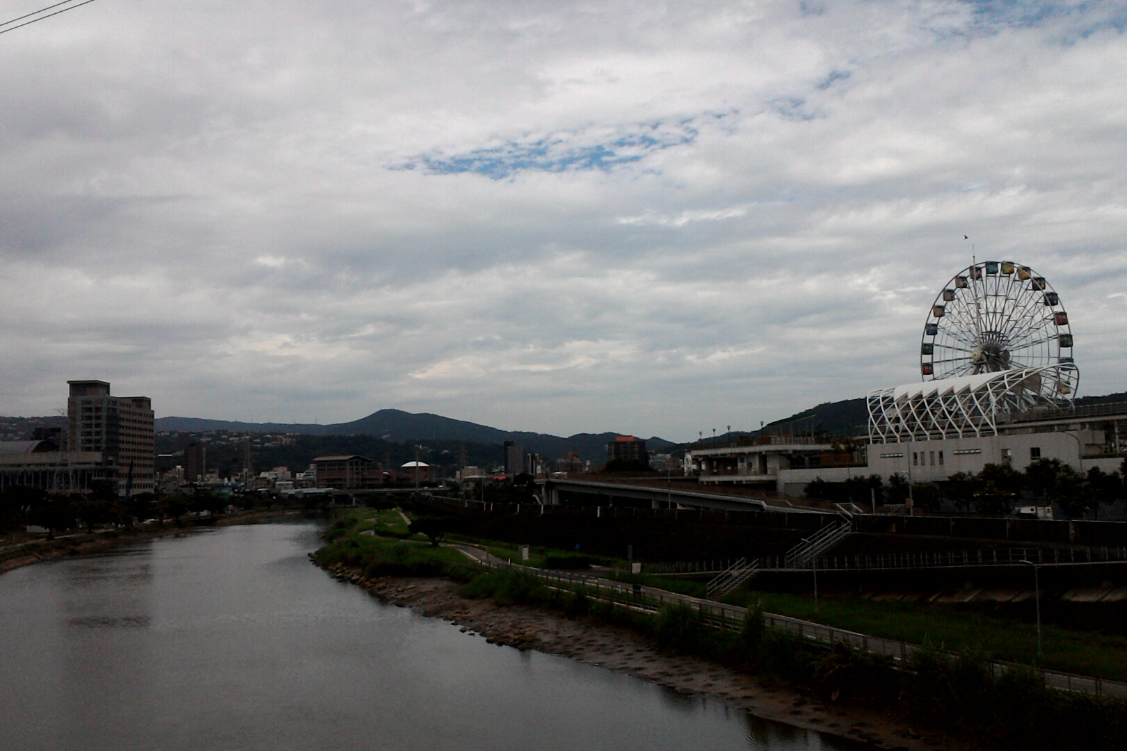 由雙溪橋向上游方向看外雙溪,台北市士林區街上次分區福佳里